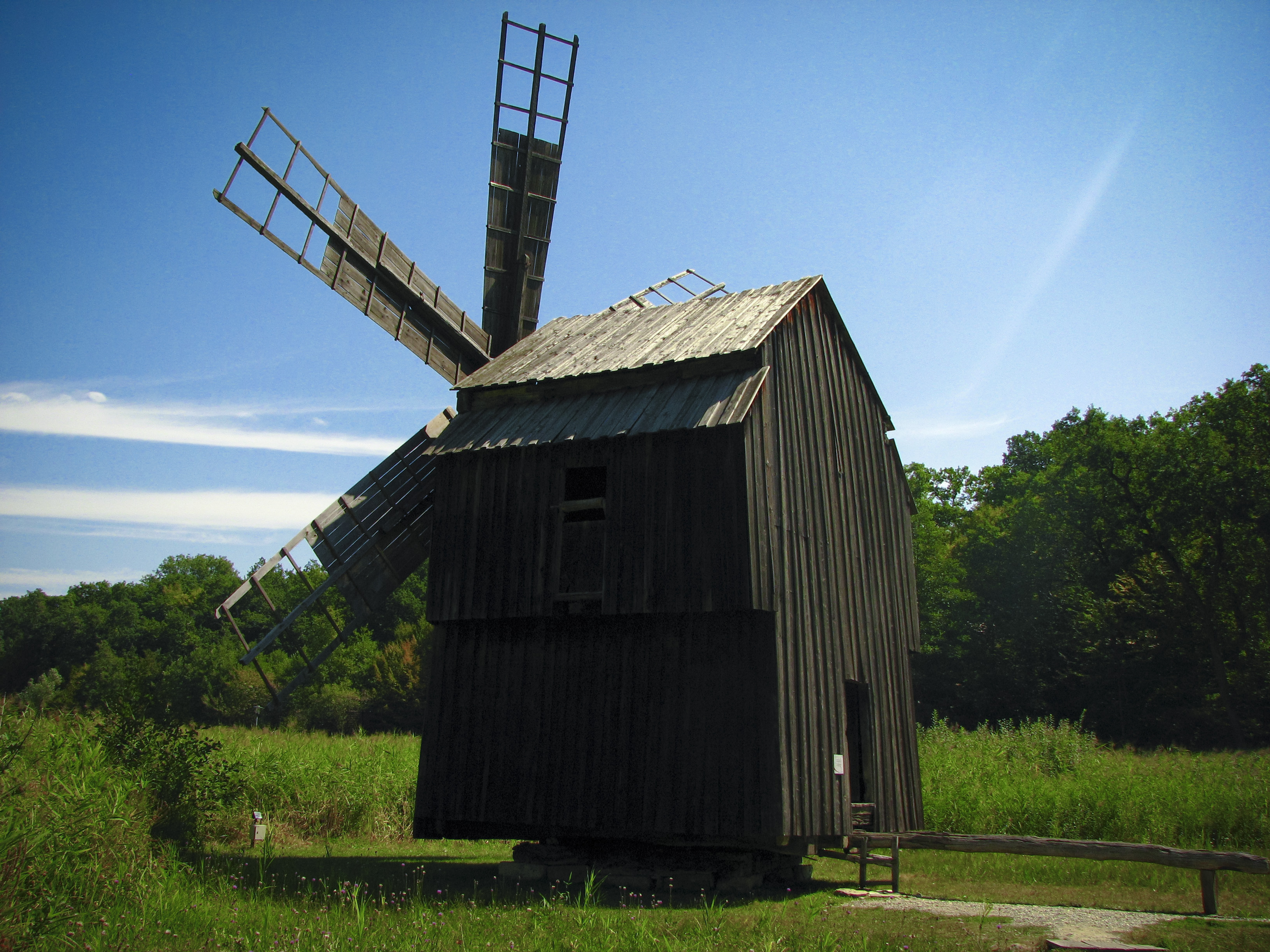 moara de vant din cadrul Muzeului Civilizației Populare Tradiționale ASTRA